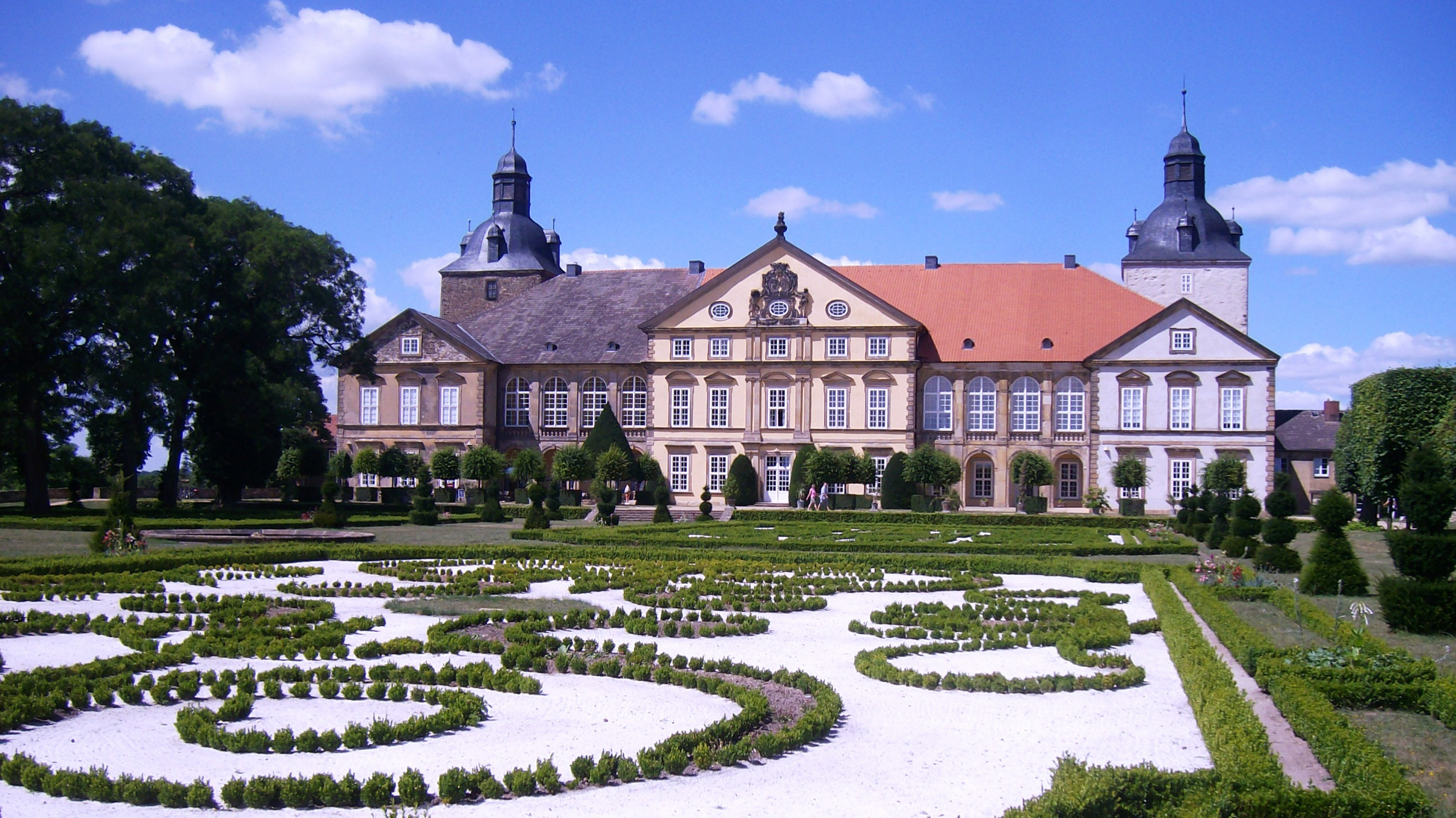 Schloss Hundisburg bei Haldensleben, Garten mit Ostfassade